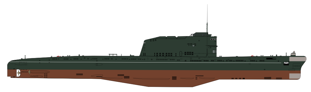 Perfil submarino clase Golf I